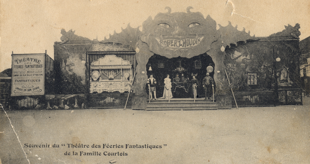 Devanture du Théâtre des Fééries Fantastiques de la famille Courtois, Carte postale datant approximativement de 1875